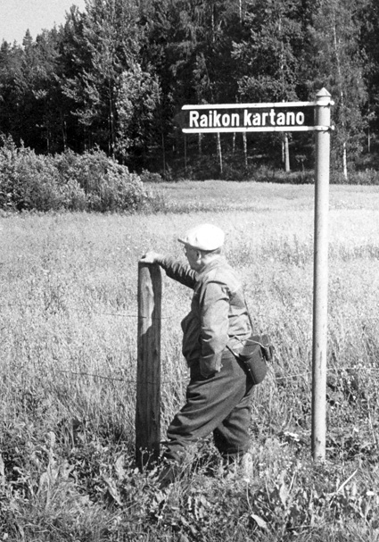 luonnonsuojelija